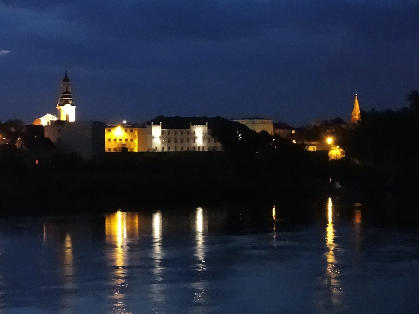 Widok Starego Fordonu (dzielnicy Bydgoszczy) od strony Wisły, widoczny m.in. kościół św. Mikołaja i św. Jana Ewangelisty